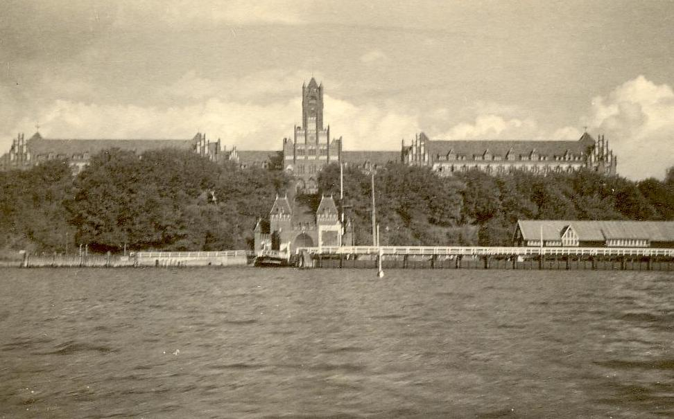 Marineakademie Mürwik 1929